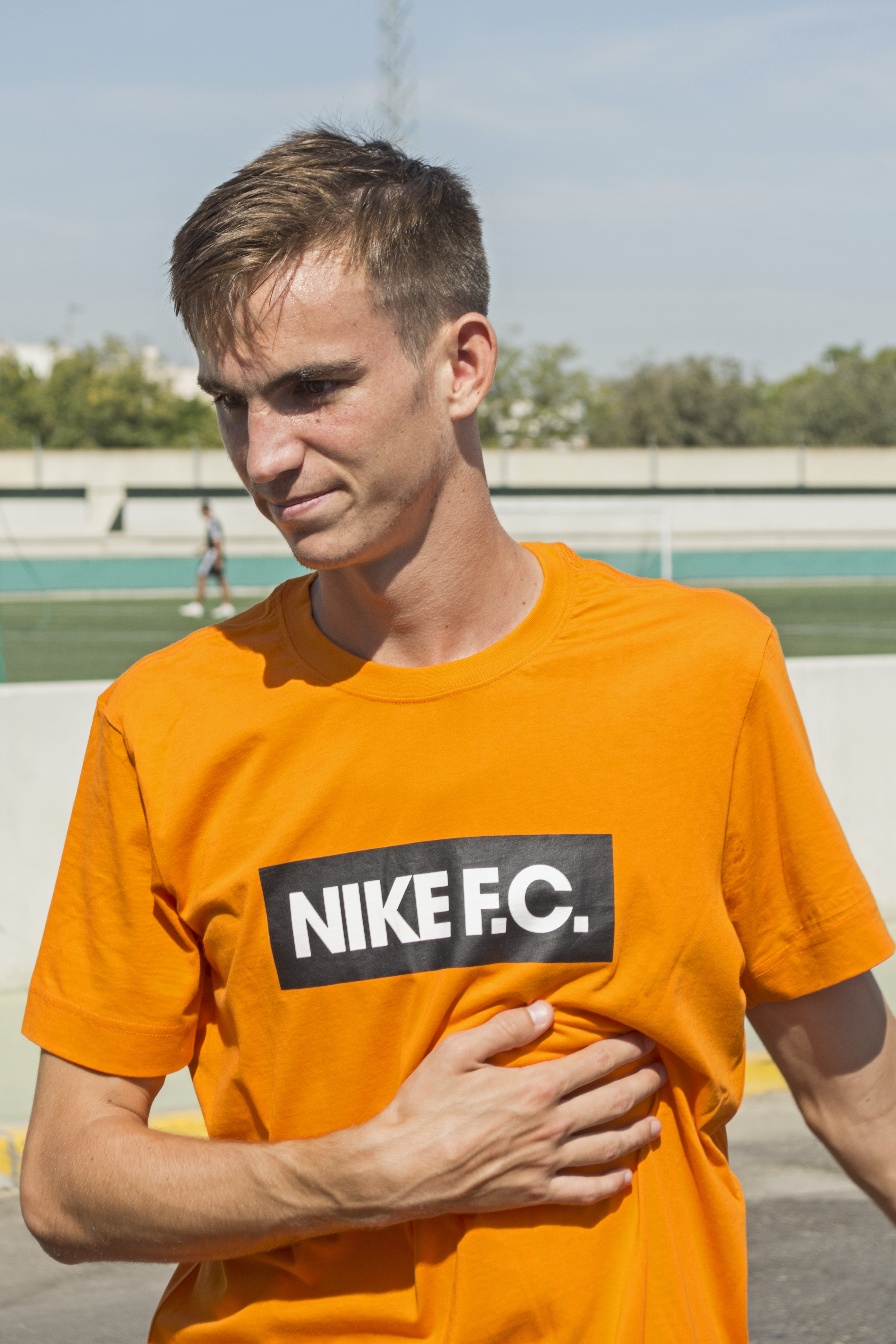 Fabián Ruiz Peña, futbolista del Real Betis. Ciudad deportiva Luis del Sol